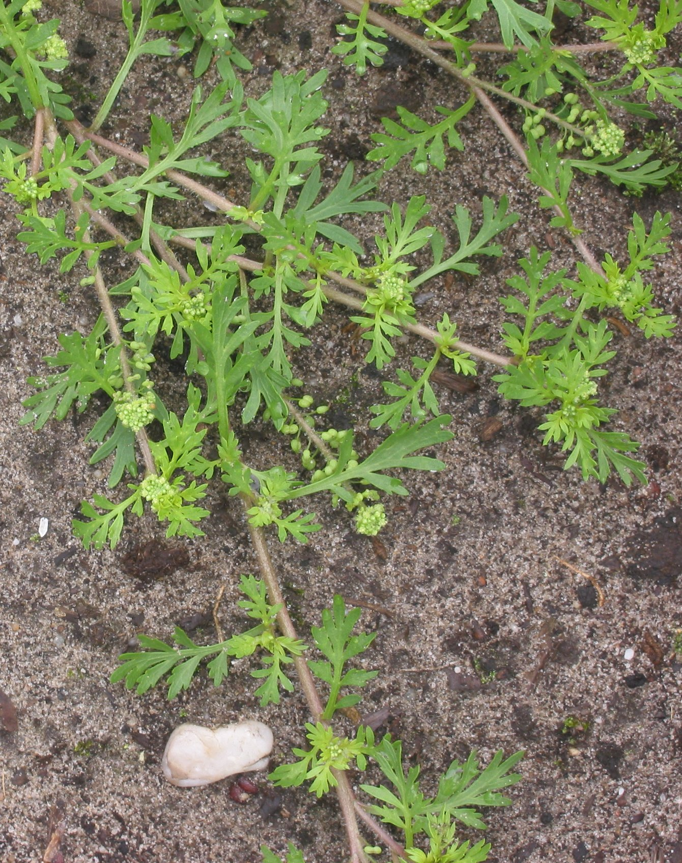 (nl: Kleine varkenskers gedeelte van de plant) Coronopus didymus